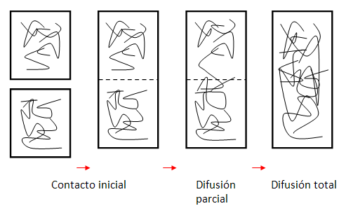 Esquema del proceso de autohesión